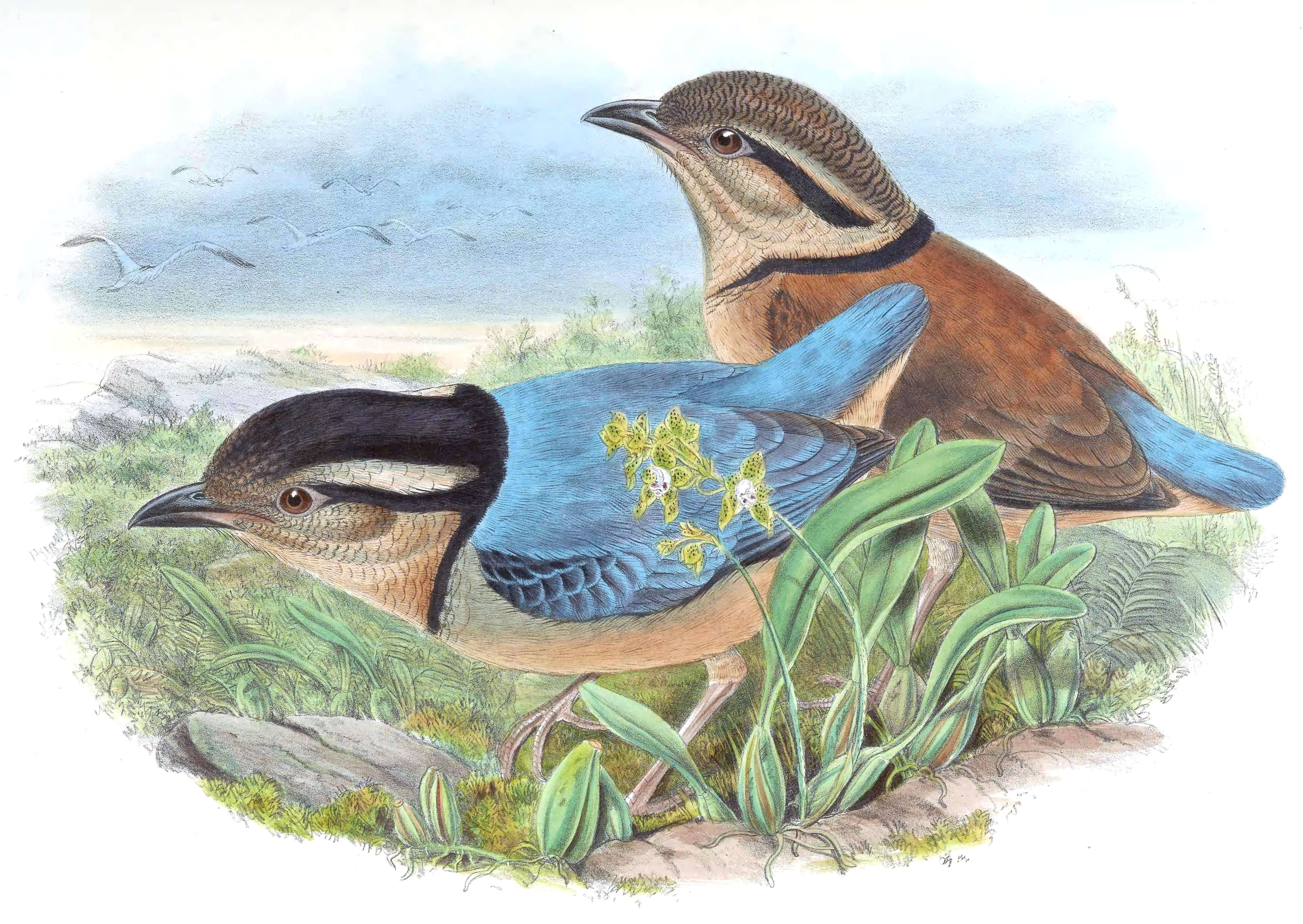 Pitta caerulea = Hydrornis caeruleus[1]